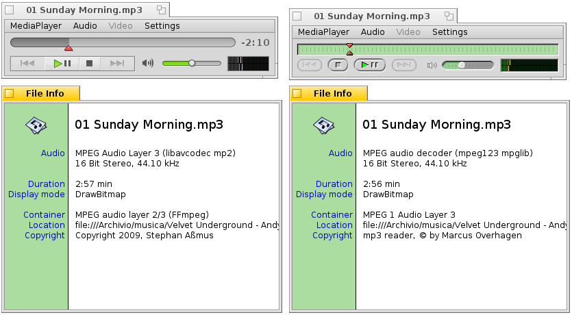 Медиа проигрыватель новый внешний вид Медиа проигрывать новый внешний вид